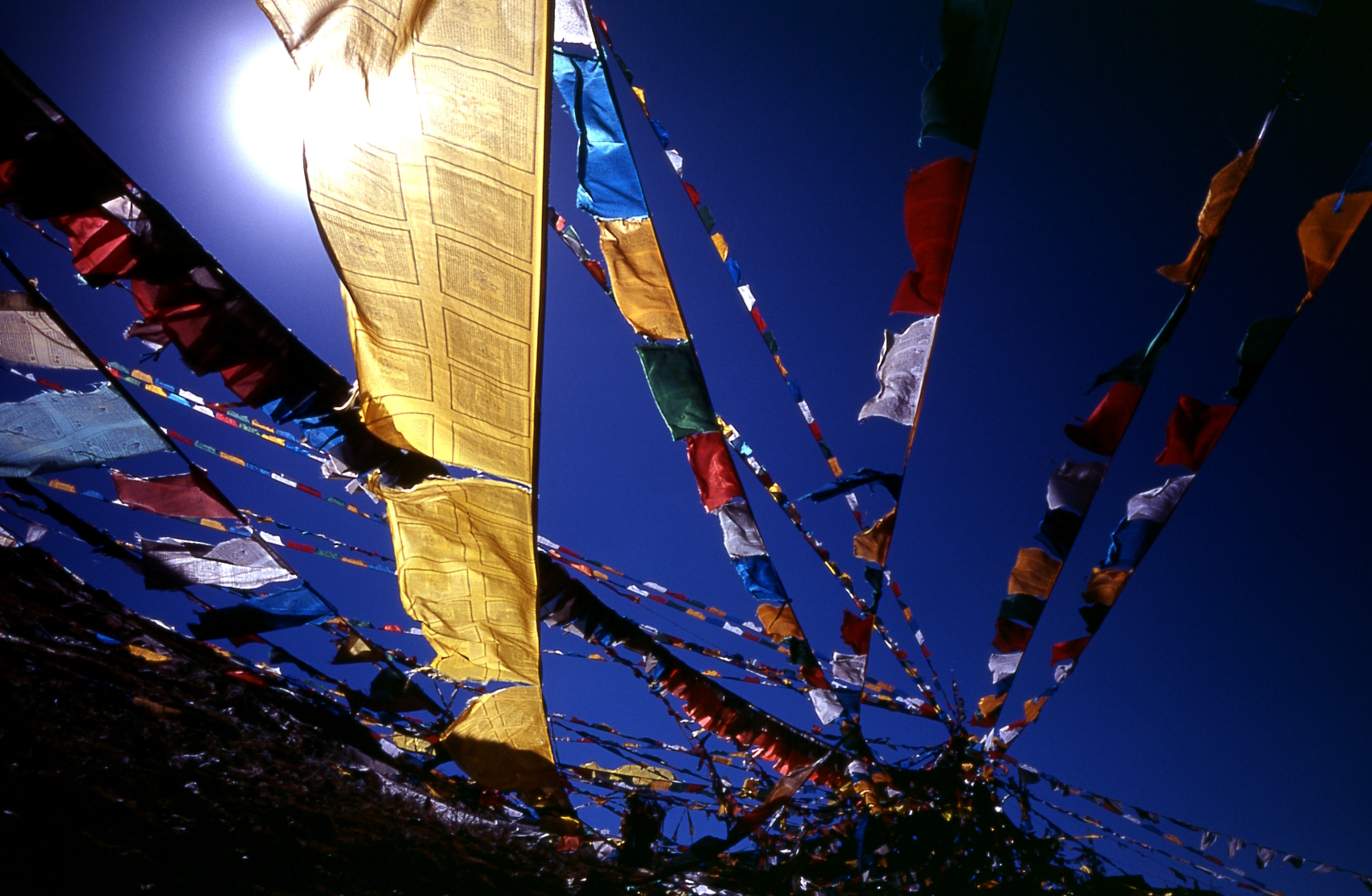 Blue sky, prayer flags, TIBET